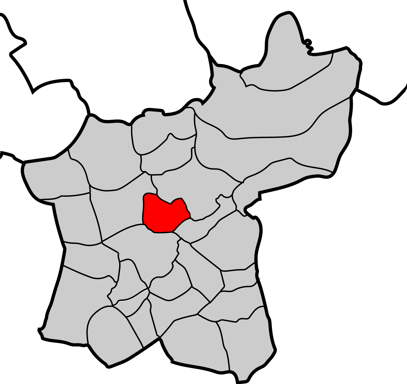 Mapa parroquia de Ferreiros Baralla